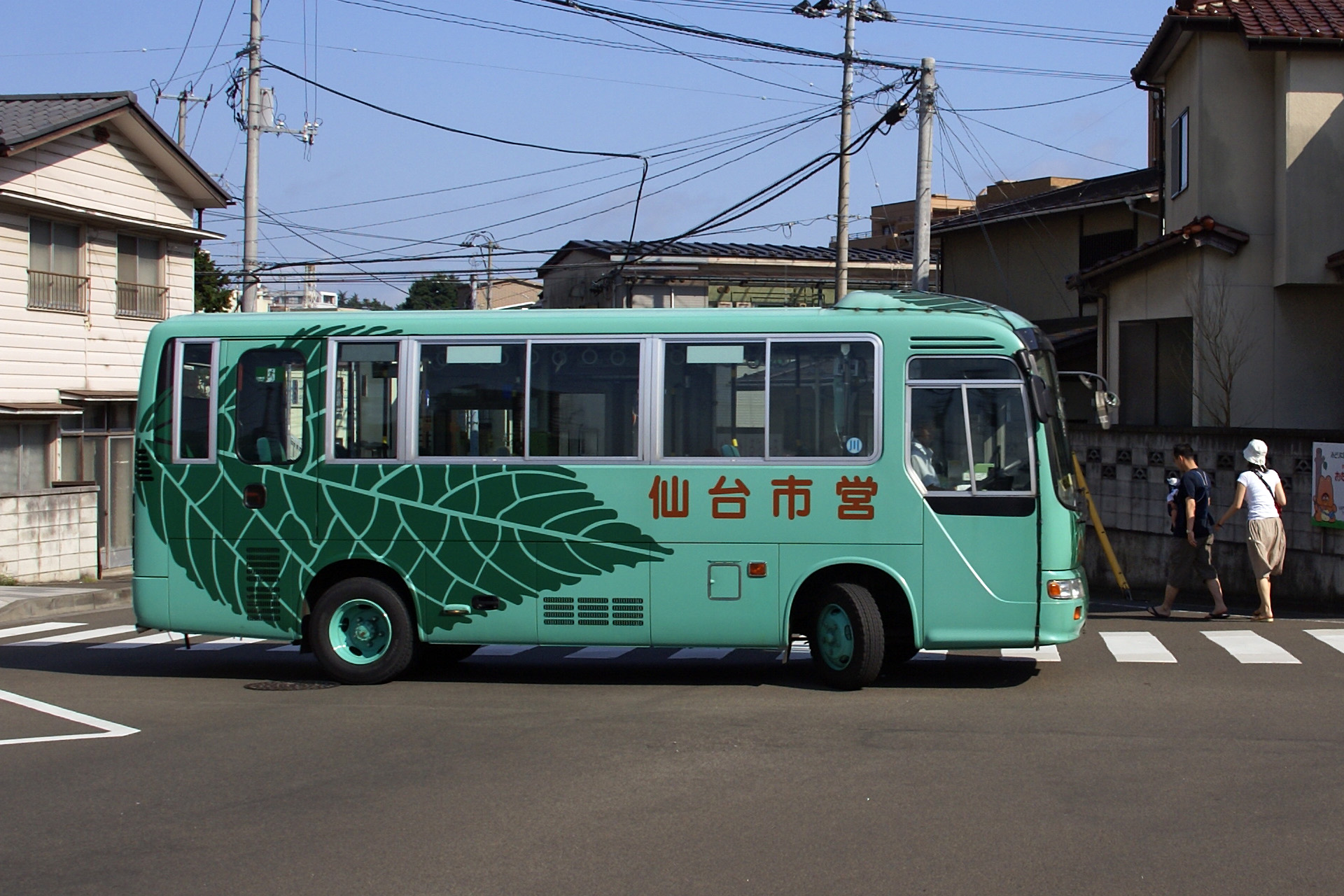 Loople Sendai